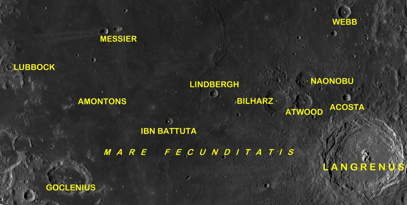 Cráter lunar Lindbergh. Localización. (Imagen LRO)